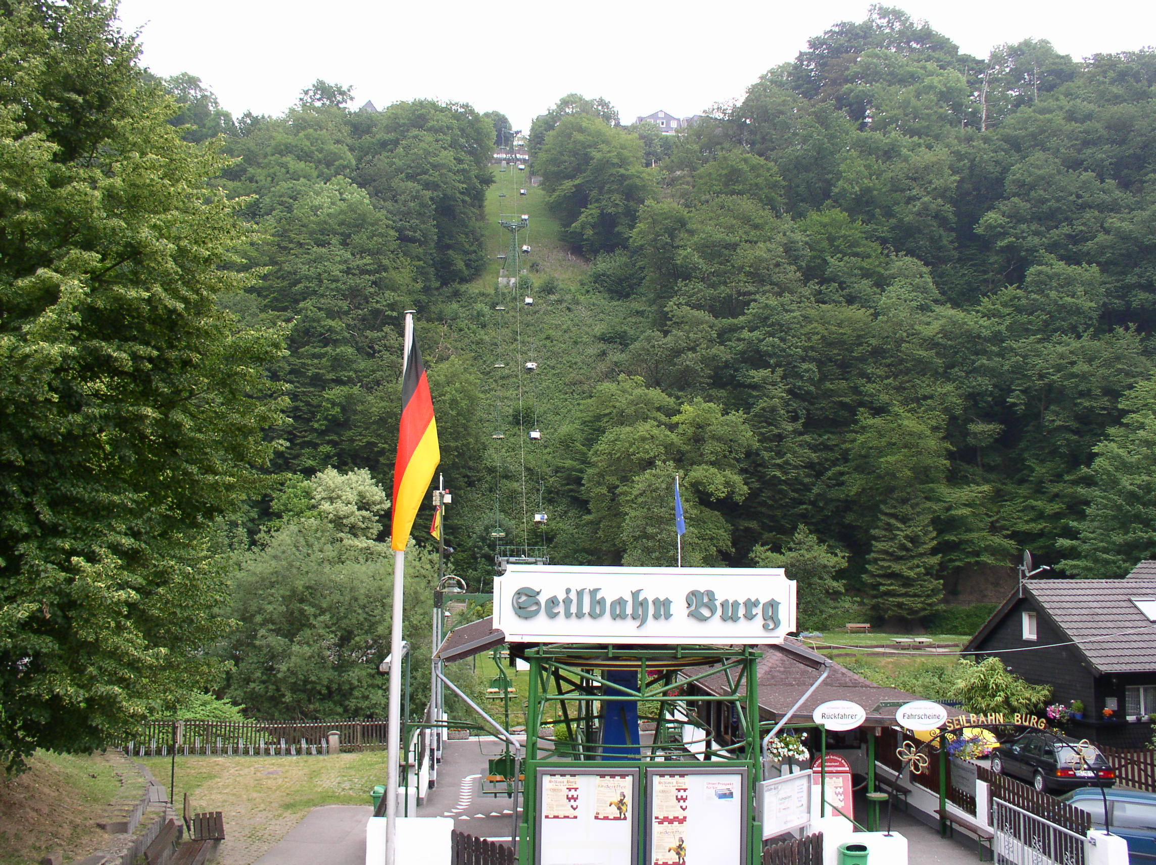 Die Seilbahn in Burg an der Wupper (Solingen, NRW, Deutschland)